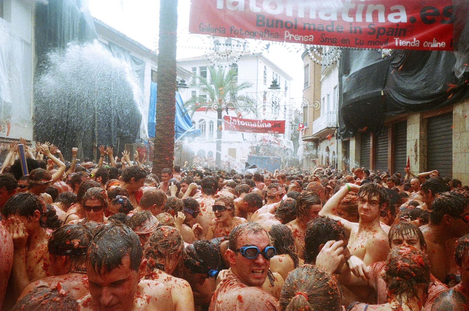 La fiesta de la tomatina 2006, Buñol (Valencia).